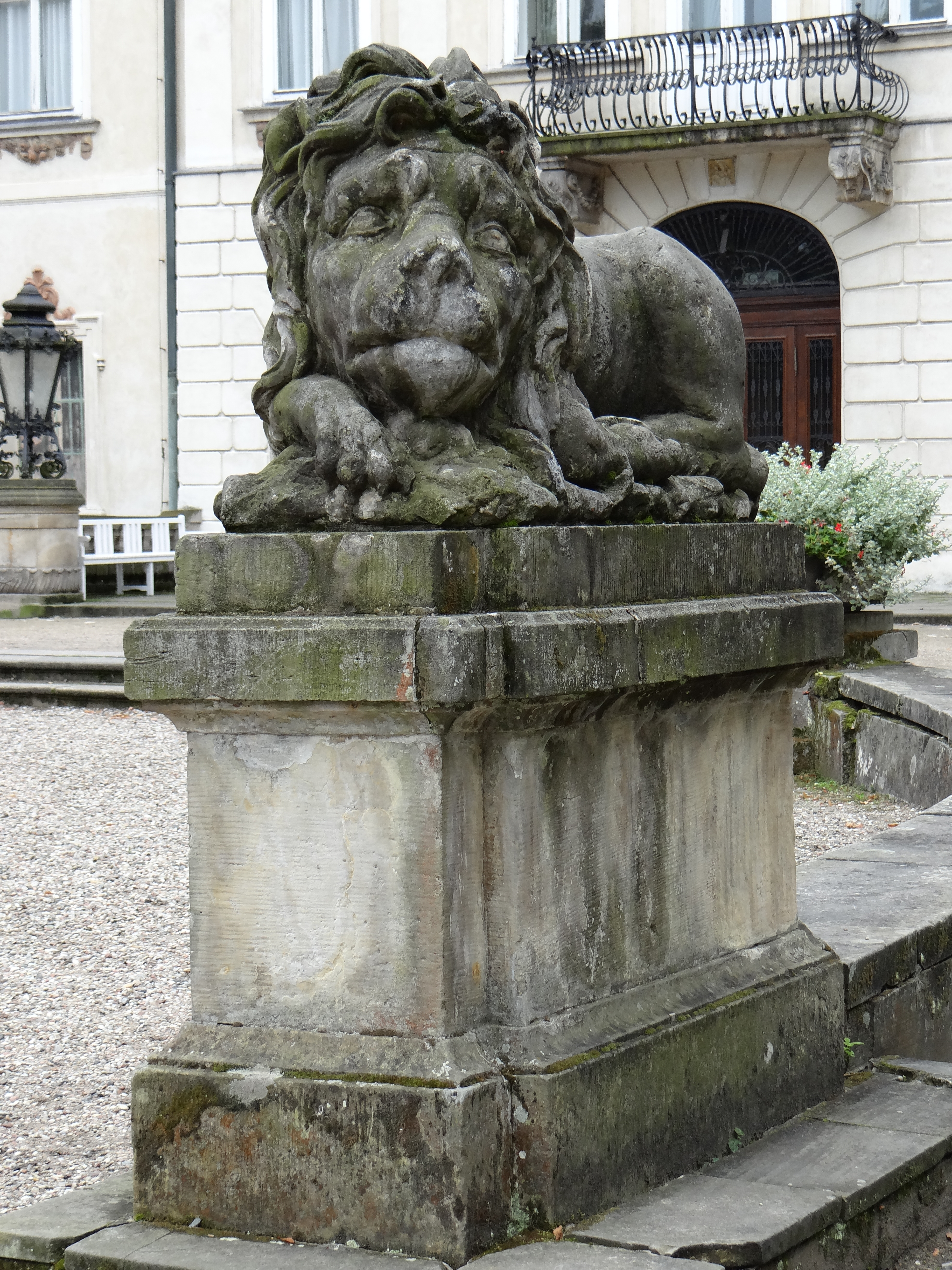 Lwy w parku a Nieborowie